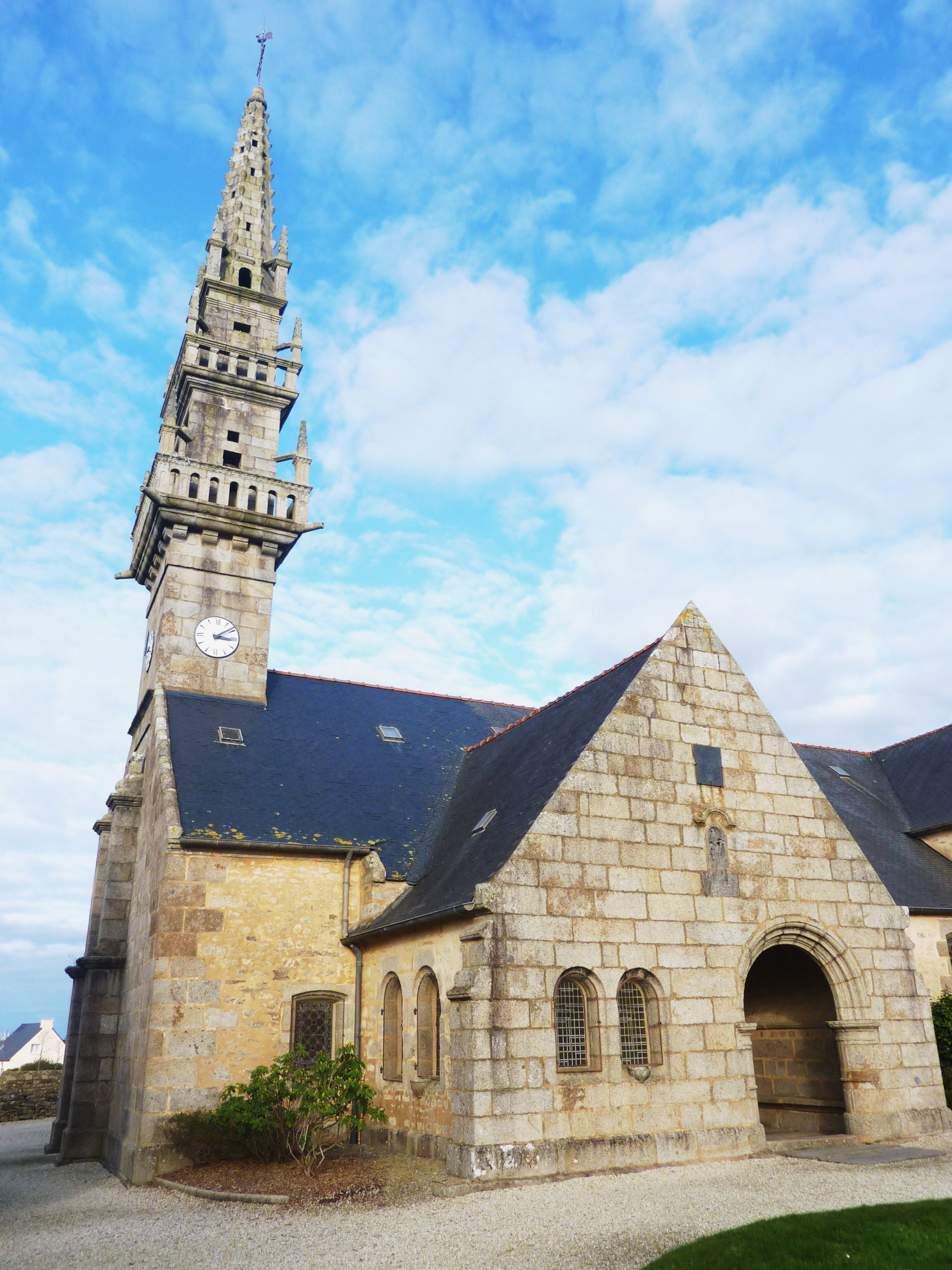 Milizac : l'église paroissiale